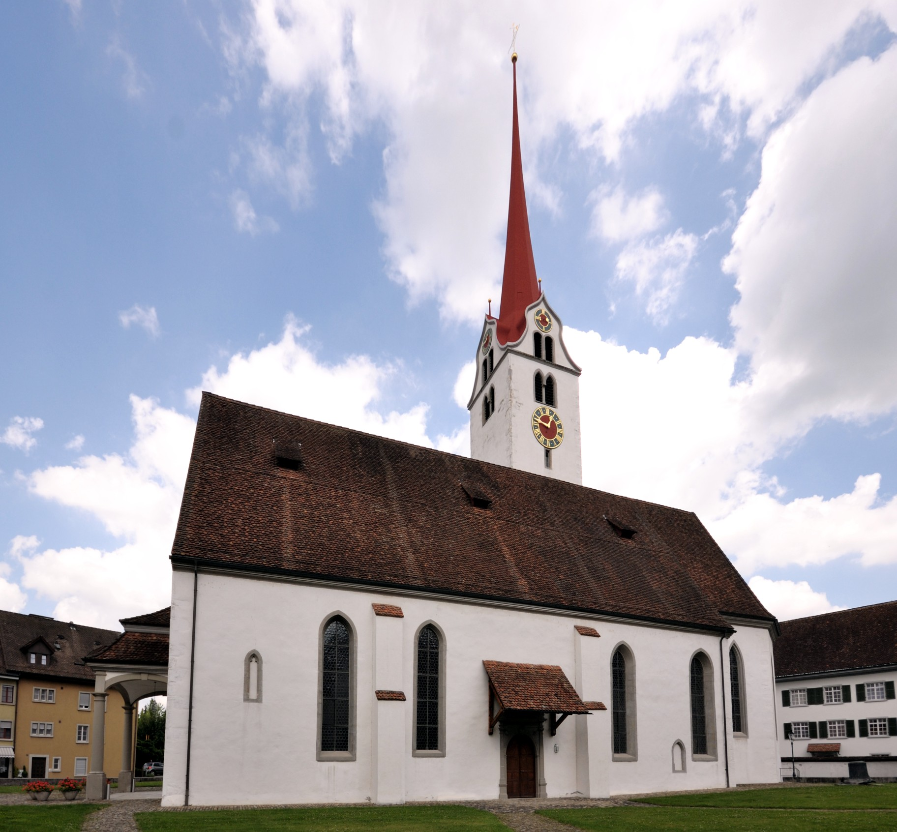 Stadtkirche Bremgarten: Ansicht von südöstlicher Richtung